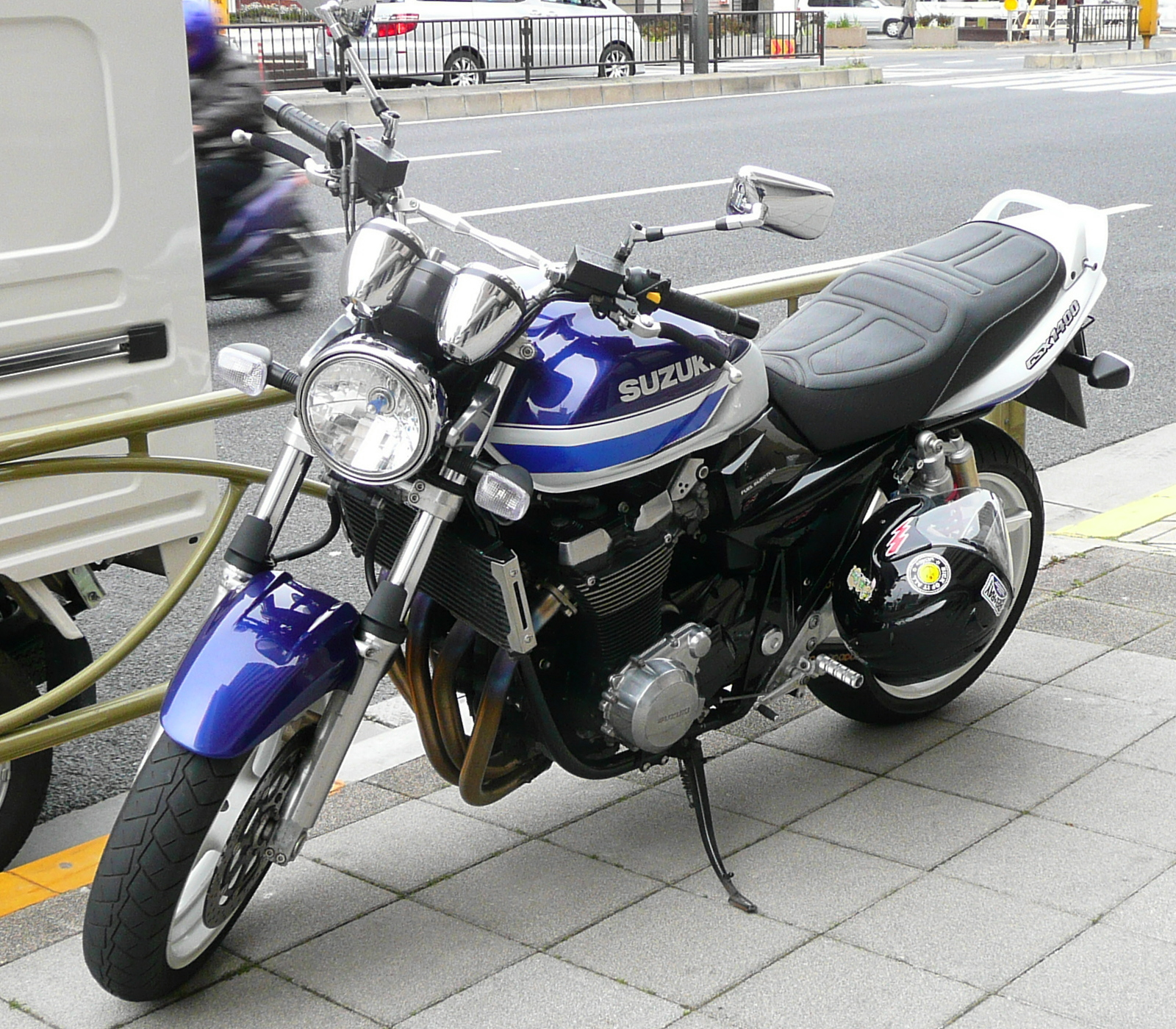 Suzuki GSX1400